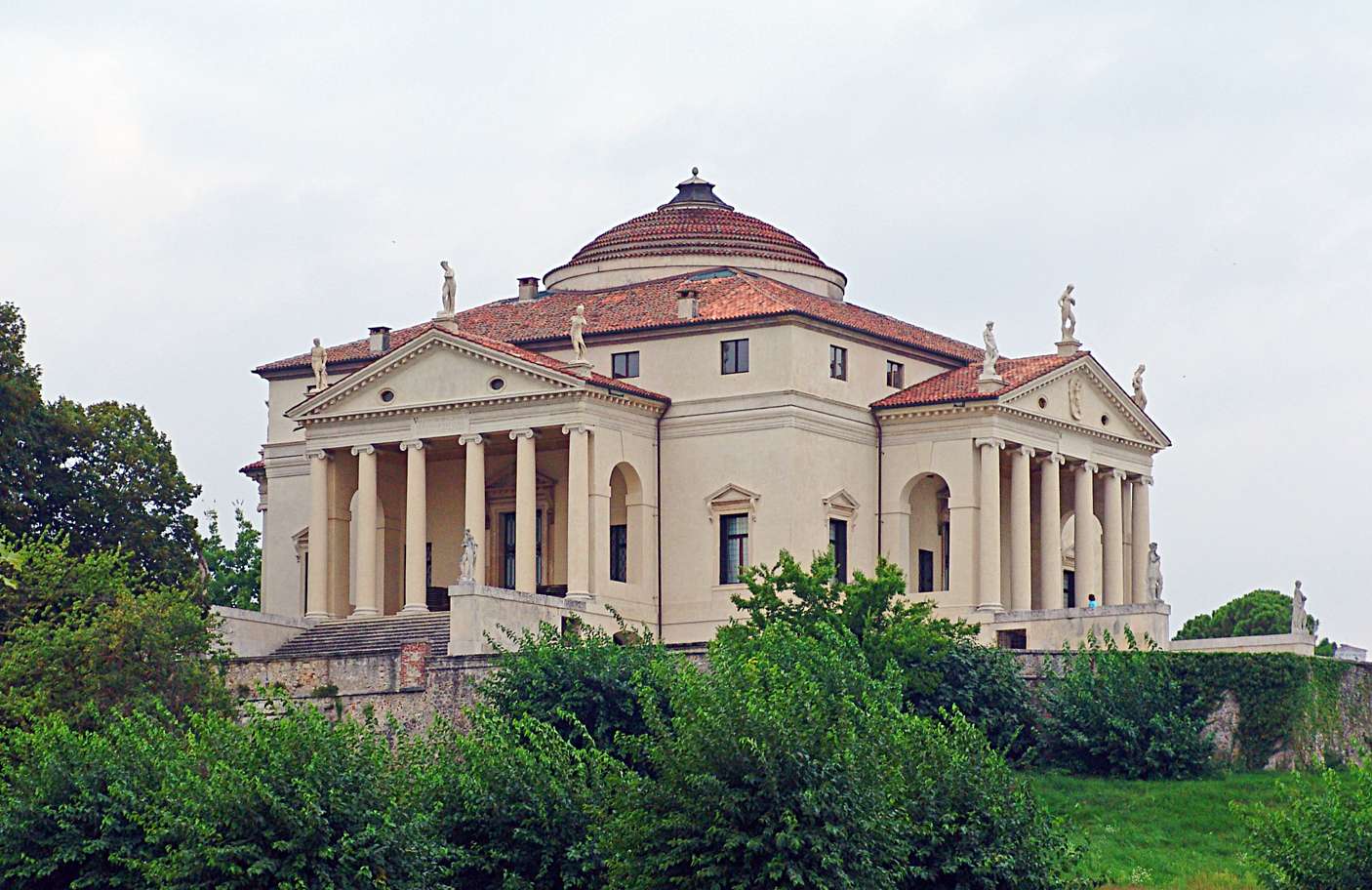 La Rotonda